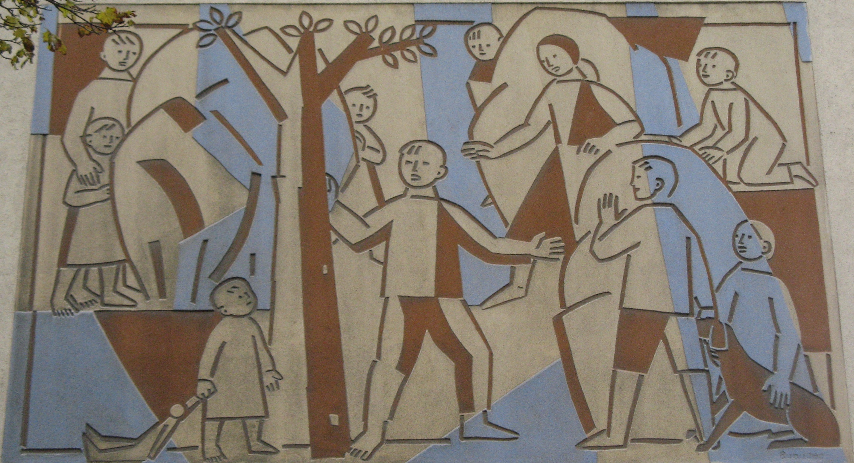 Spielende Kinder (1955), Sgraffito von Hans Babuder, Troststraße 8, Wien-Favoriten